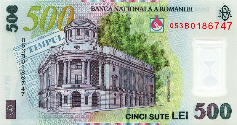 500 Leu reverse; Ro: Bancnota de 500 RON prezintă pe revers o imagine a ziarului Timpul precum și sediul Bibliotecii Centrale Universitare „Mihai Eminescu” din Iași